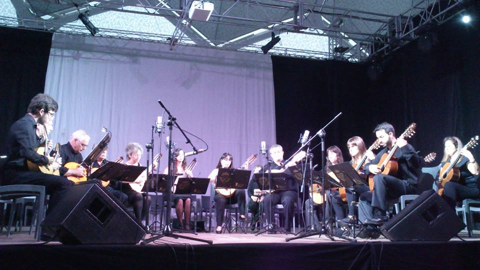 Concierto realizado por la Orquesta de Laúdes Conde Ansúrez en septiembre de 2014 en Valladolid (España)